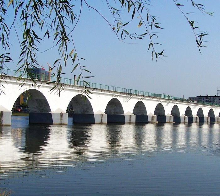 Fushun Hunhe River